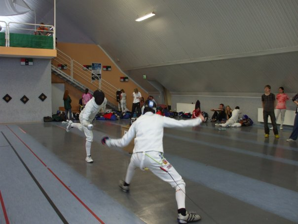 Česky: Richard Pokorný ve finále proti Michalu Čuprovi na Mistrovství republiky jednotliců v kordu juniorů v roce 2009